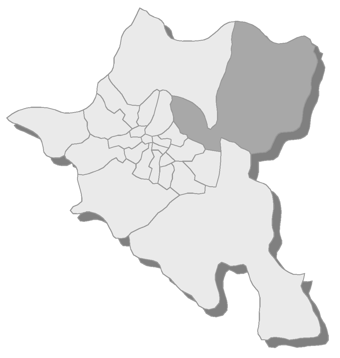 Sofia, municipality Kremikovtzi